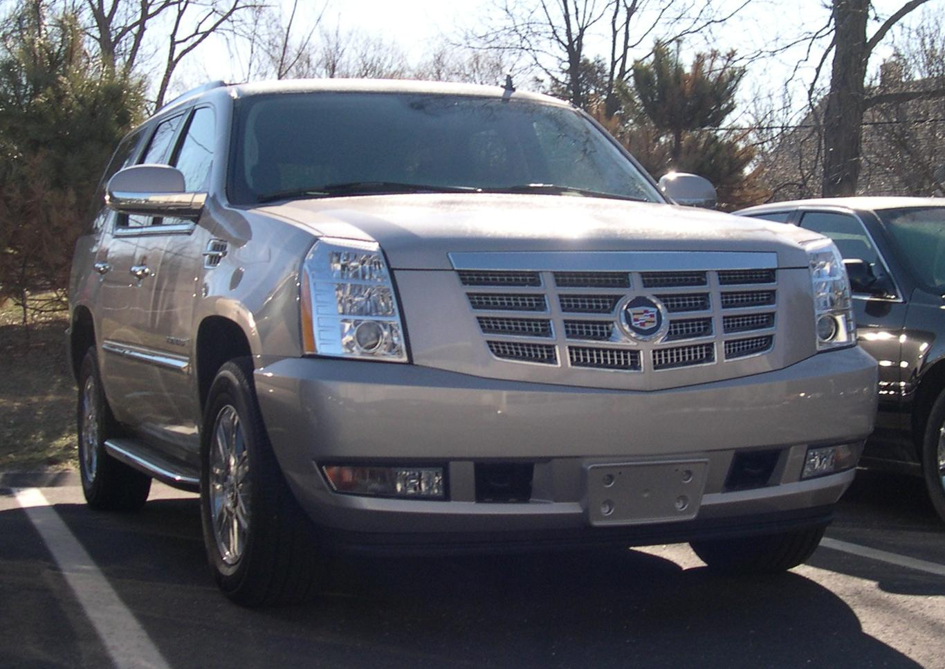 2007 GMT900 Cadillac Escalade in Radiant Bronze